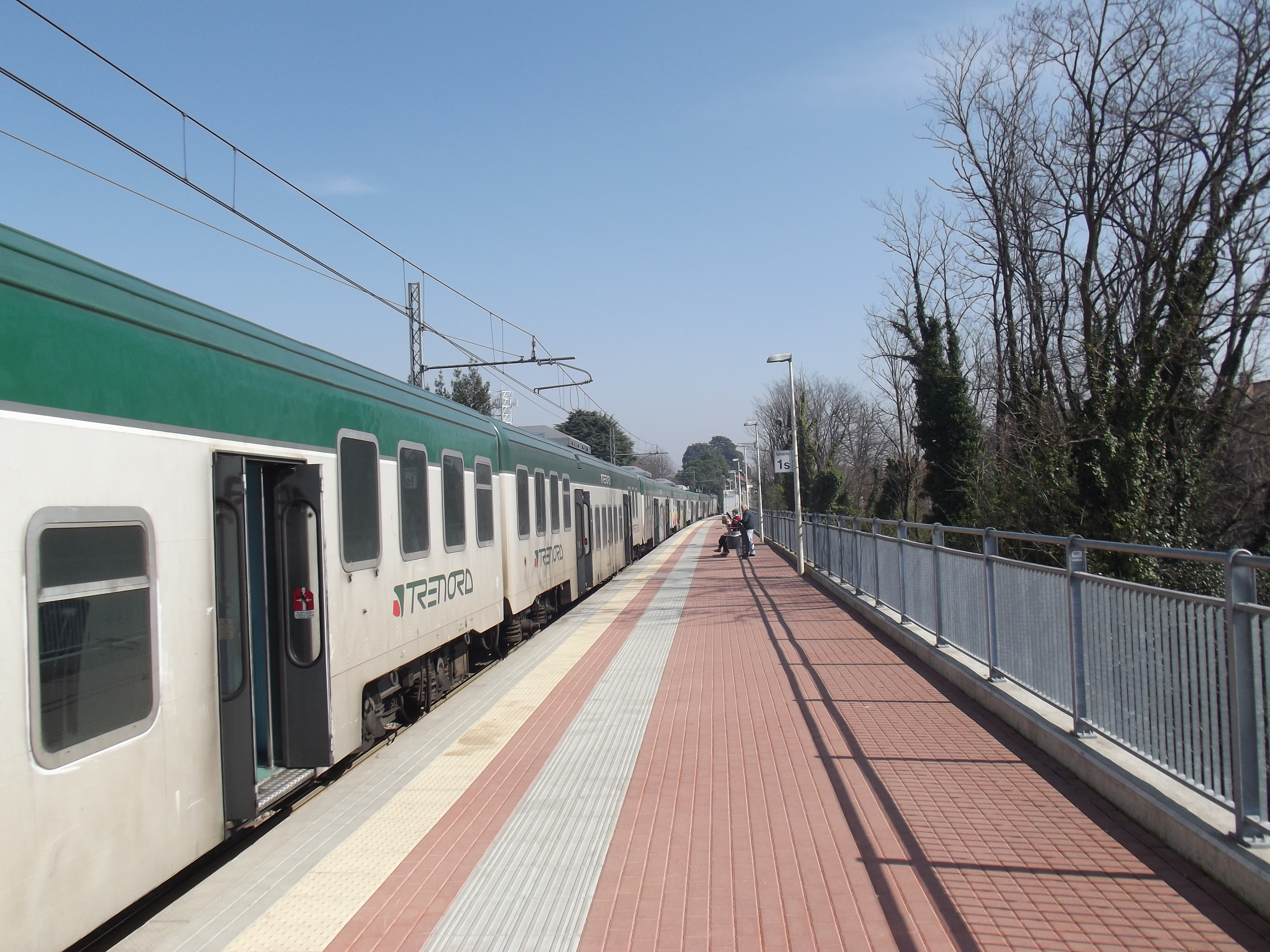 Il piazzale superiore della stazione ferroviaria di Cesano Maderno, composto dall'unico binario della linea Novara-Seregno. In sosta un treno della linea S9, composto da carrozze a piano ribassato ristrutturate, in livrea Trenord.